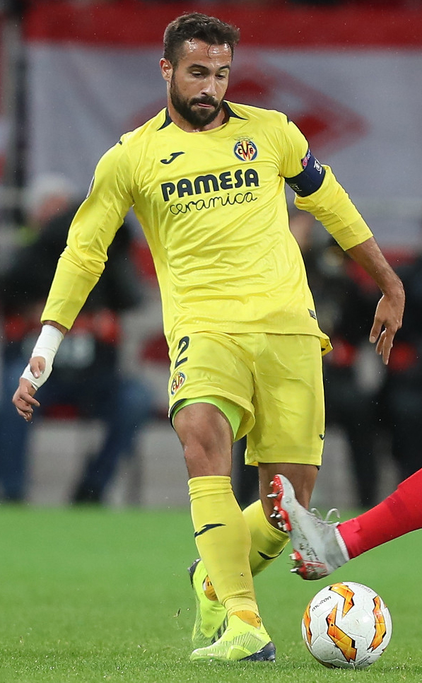 Битва на «Открытие-Арене». «Спартак» поделил очки с «Вильярреалом»